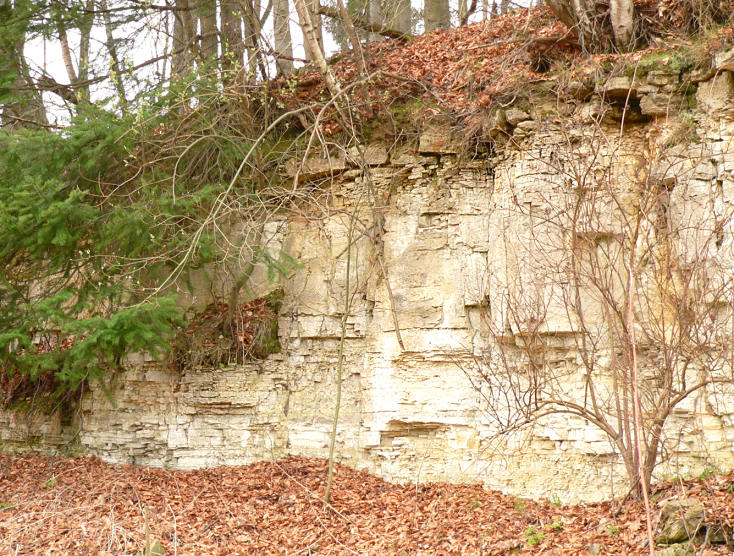 Elmkalkstein nahe einem früheren Steinbruch bei Königslutter